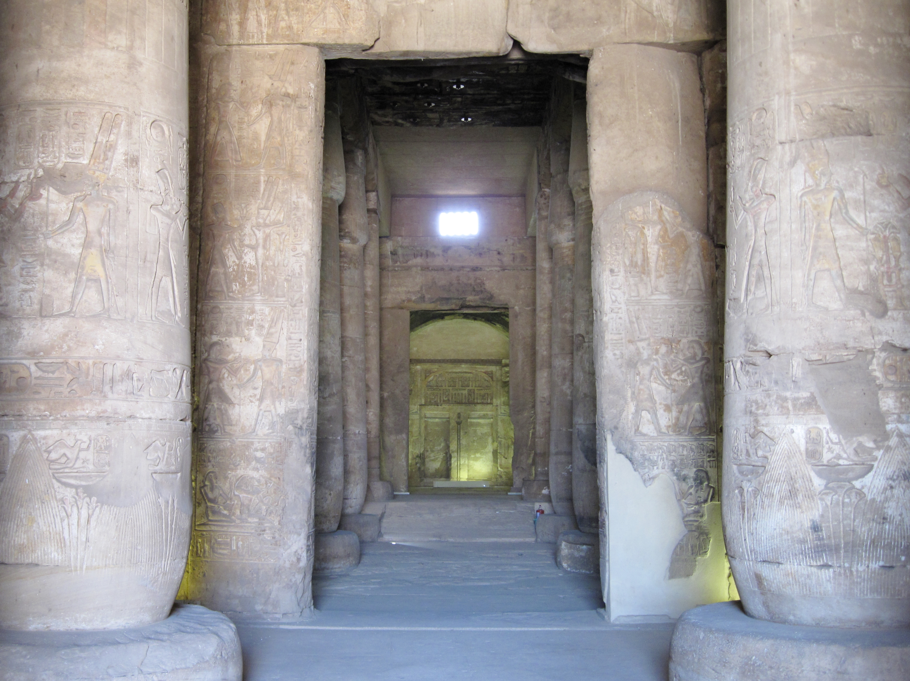 Blick vom Eingang des Totentempels Sethos I. in Abydos auf das Heiligtum des Amun-Re, Ägypten